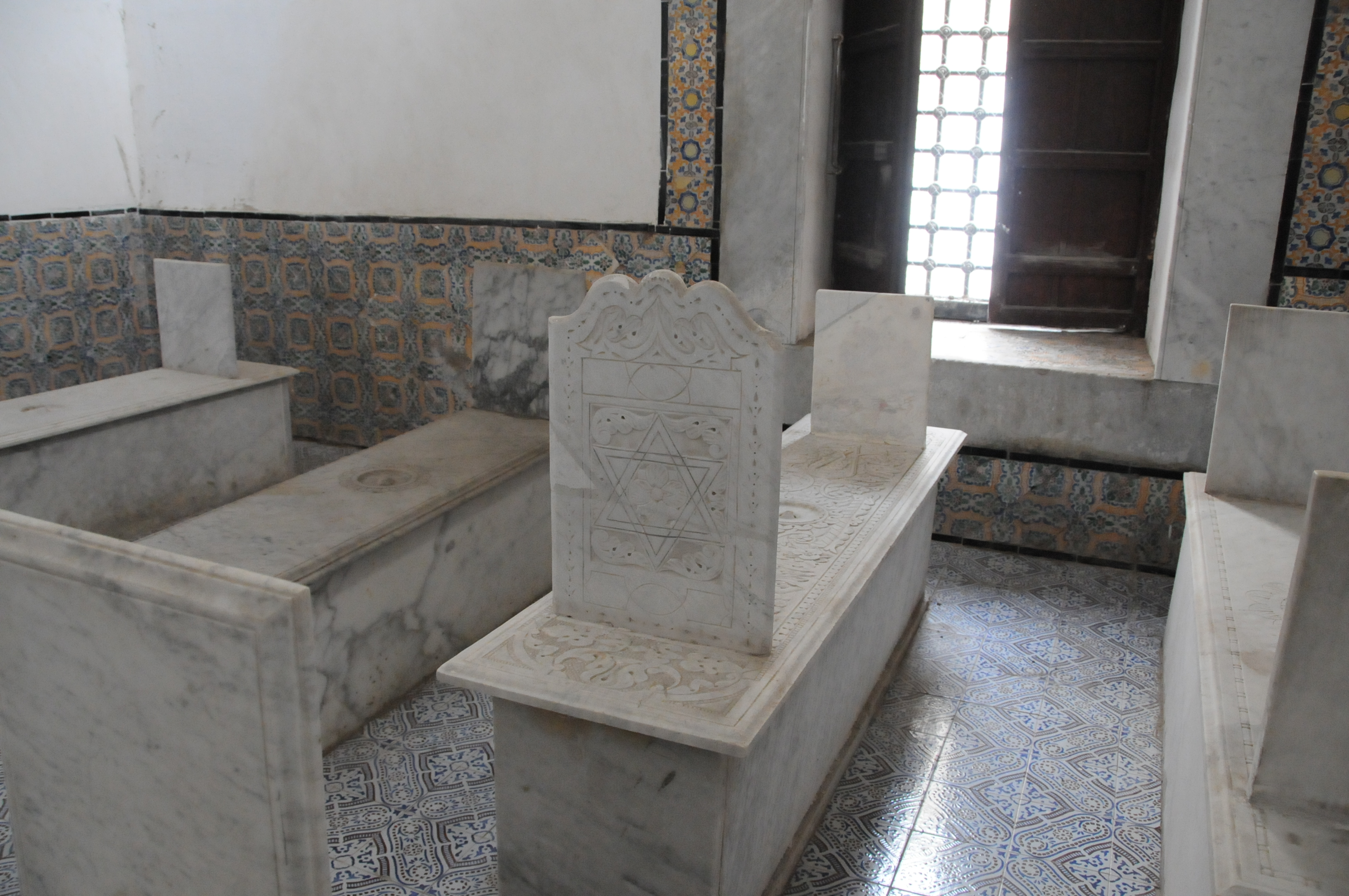 Pierre tombale d'un dignitaire de confession juive à Tourbet El Bey dans la médina de Tunis